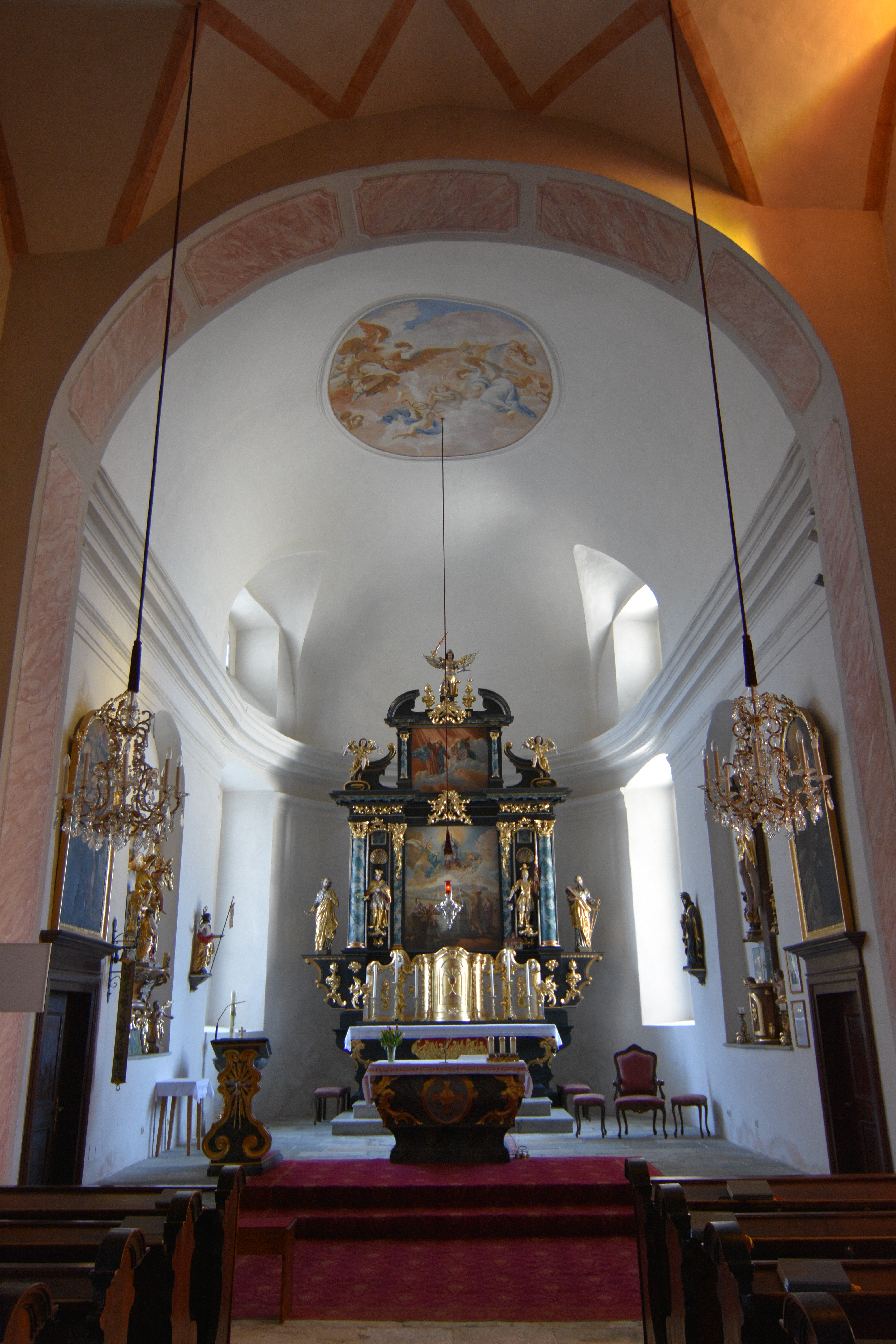 Church hl. Jakobus d. Ä. (Sankt Jakob im Walde) - Interior